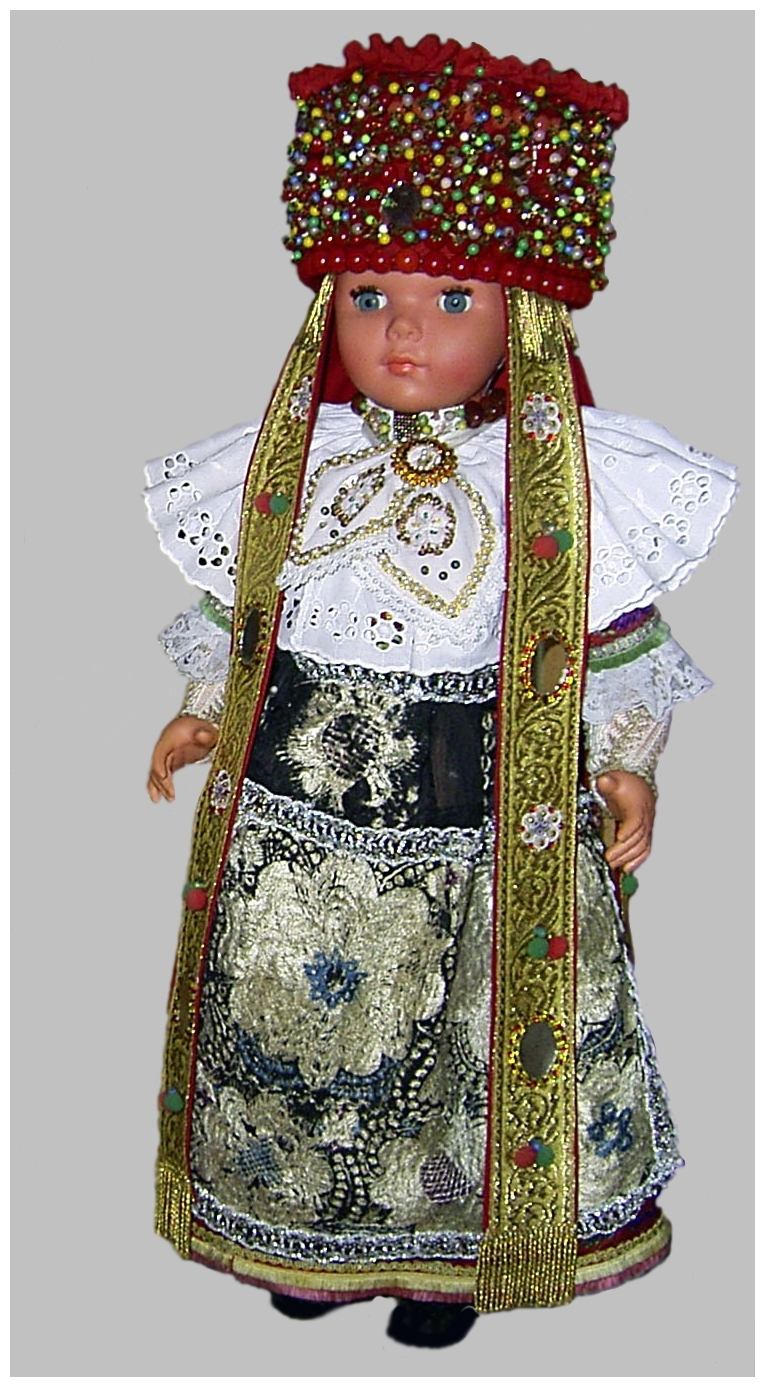 Schaumburger Hochzeitstracht Copyright: GNU FDL